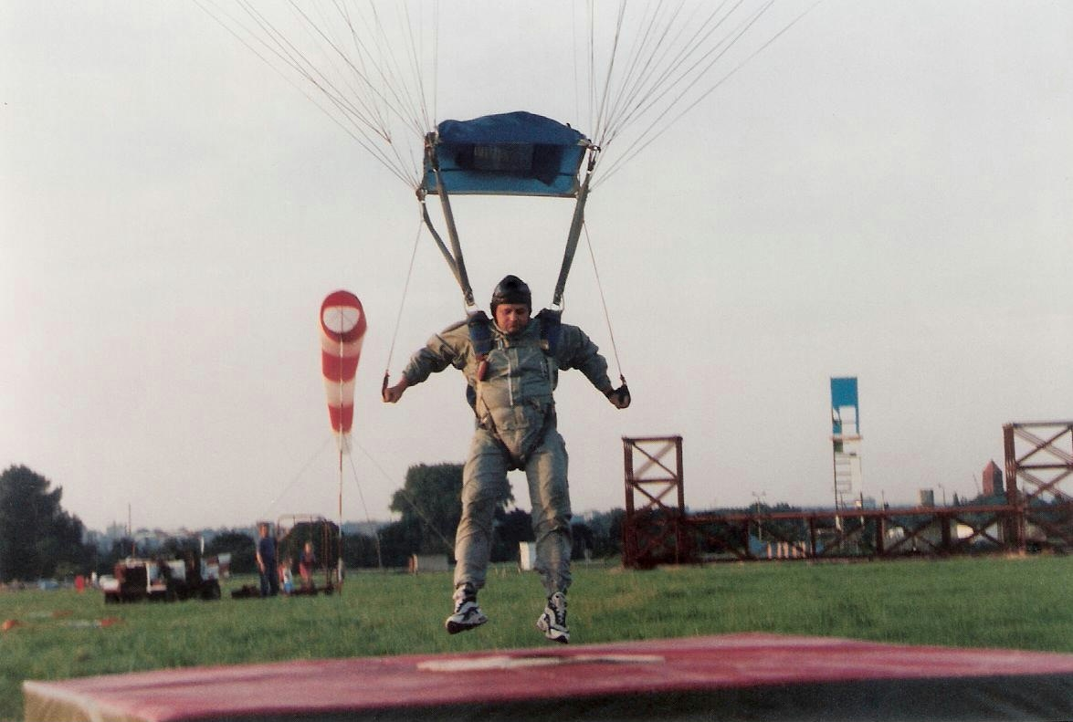 Międzynarodowe Spadochronowe Mistrzostwa Śląska 2000. Waldemar Zygała skok na celność lądowania - Sekcja Spadochronowa Aeroklubu Gliwickiego